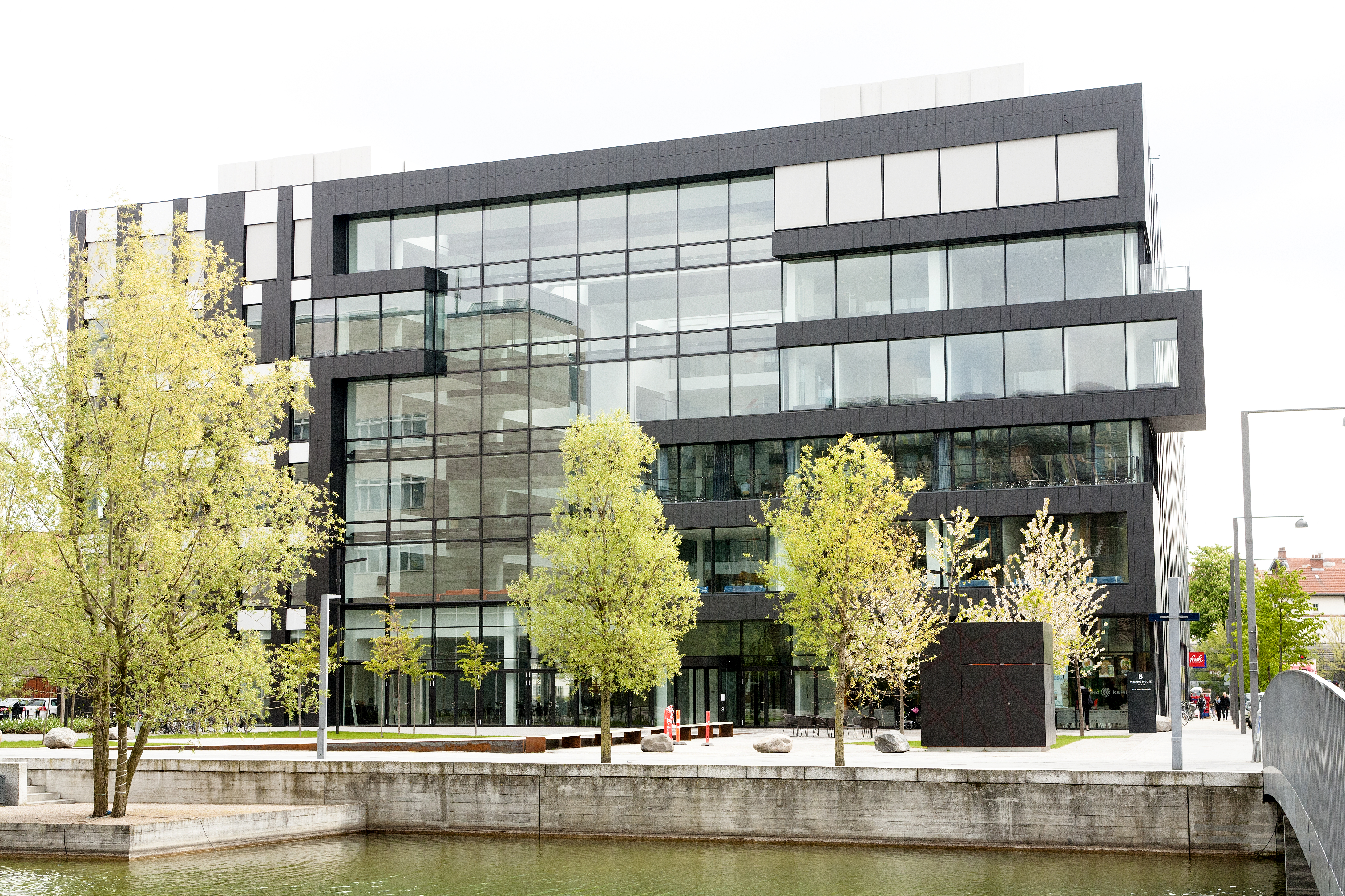 Mikado House, Ørestad - 2011-05-05. Foto: News Øresund – Jenny Andersson. © News Øresund. Bilden får fritt publiceras under förutsättning att källa anges. (The picture can be used freely under the prerequisite that the source is given. ) Architecture, Business. Originalfil tillhandahålles gratis, kontakta: News Øresund, Malmö, Sweden. News Øresund är en oberoende regional nyhetsbyrå som ingår i projektet Øresund Media Platform som drivs av Øresundsinstituttet i partnerskap med Lunds universitet och Roskilde Universitet och med delfinansiering från EU (Interreg IV A Öresund) och 14 regionala, icke kommersiella aktörer.